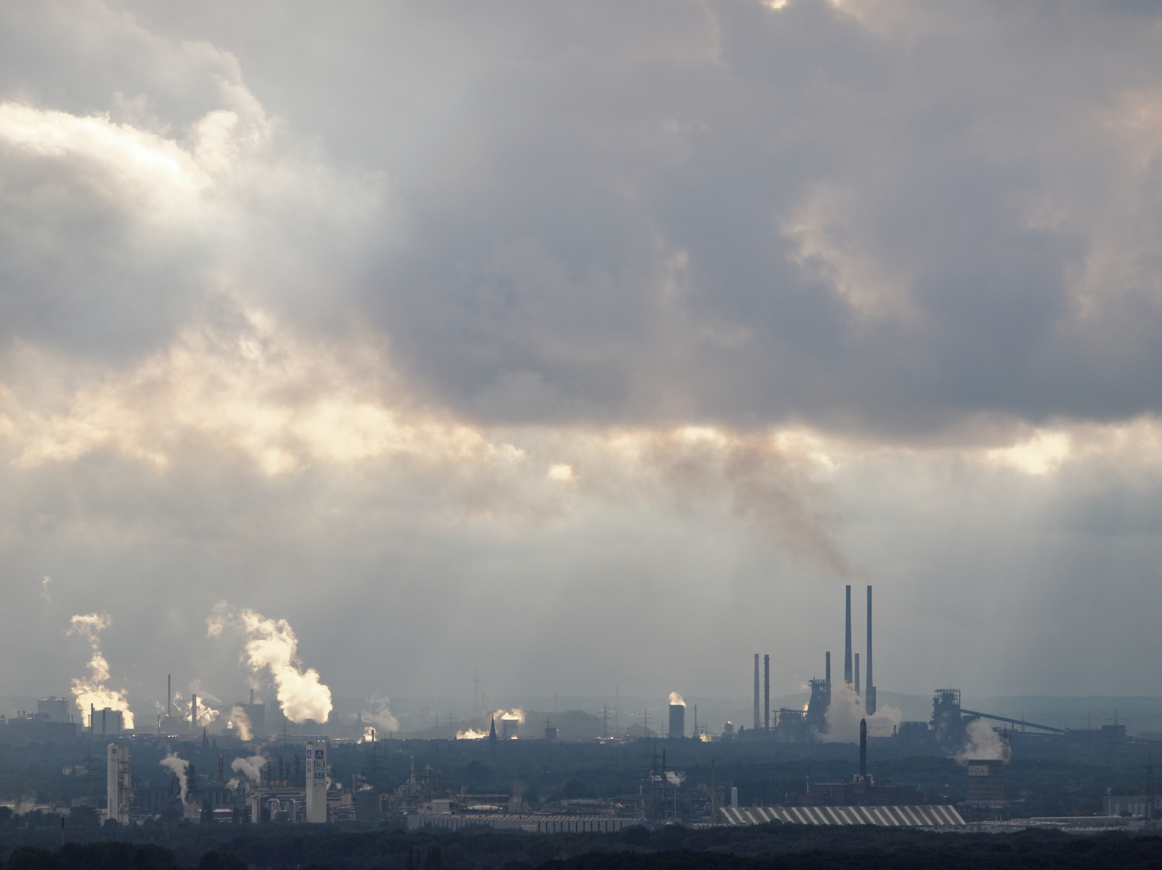 Ausblick von der Halde Haniel in Bottrop nach Westen auf die Werksanlagen von ThyssenKrupp in Duisburg.